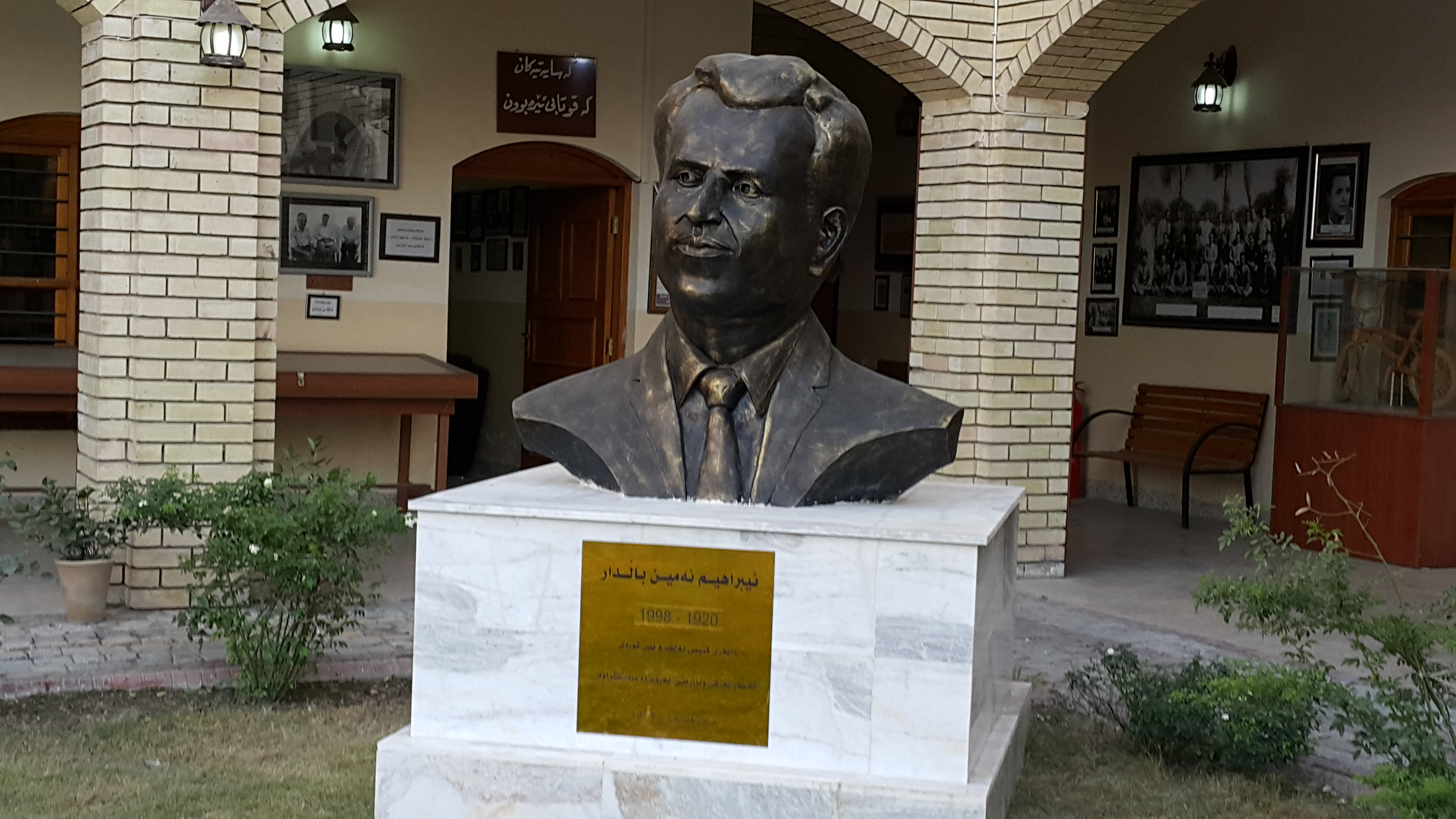 کوردی: پەیکەری ئیبراهیم باڵدار لە قوتابجانەی ئەربیل ئولا یاخوود مۆزرخانەی پەروەردەیی لەهەولێر